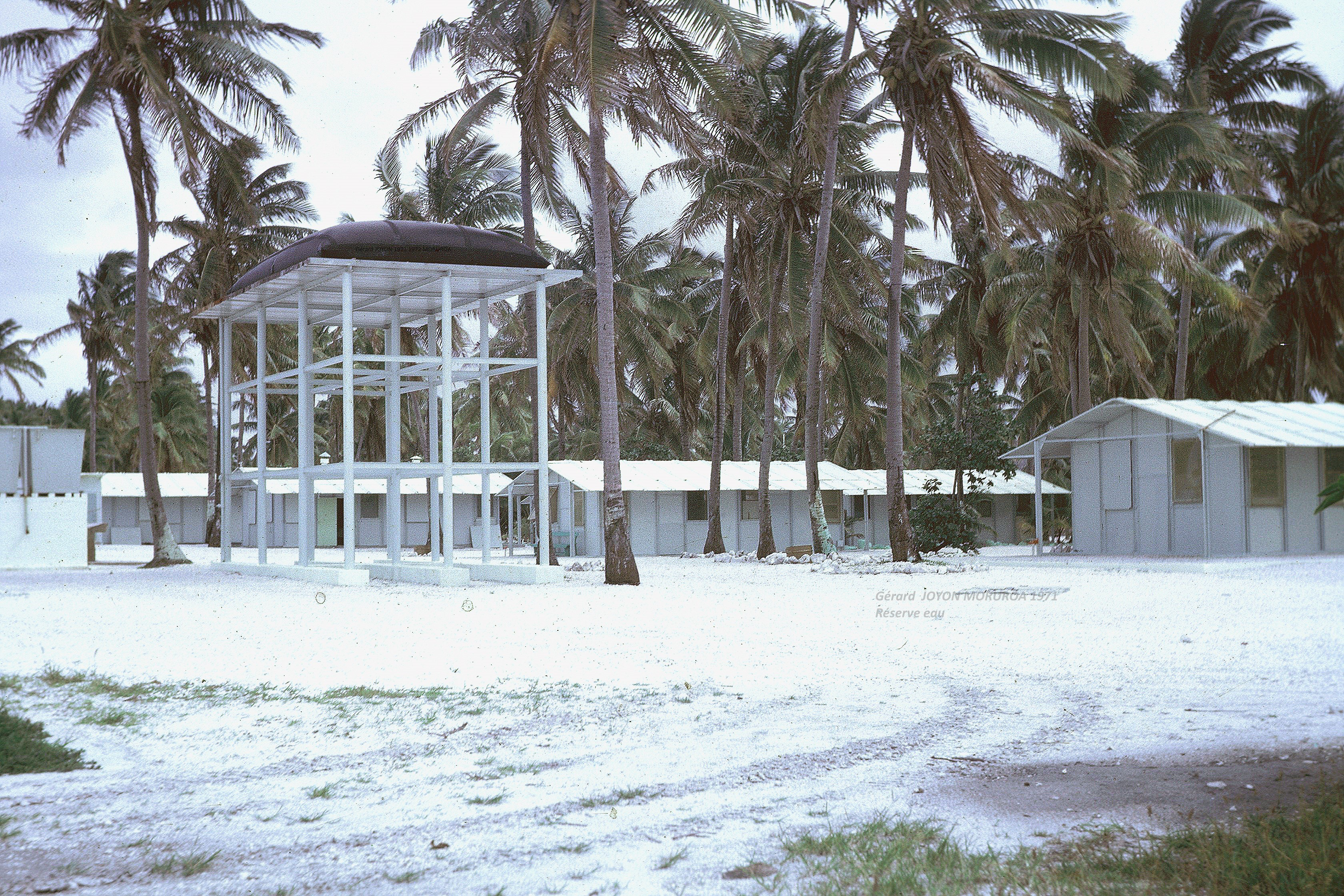 Moruroa 1971 logements et réserve d'eau pendant la période des tirs.Nous voyons sur ce cliché les chambres des militaires. Sur des poteaux, une réserve d'eau utilisée pour la boisson et la douche.Ce cliché est tiré de mon dossier TPMI de NIMES.